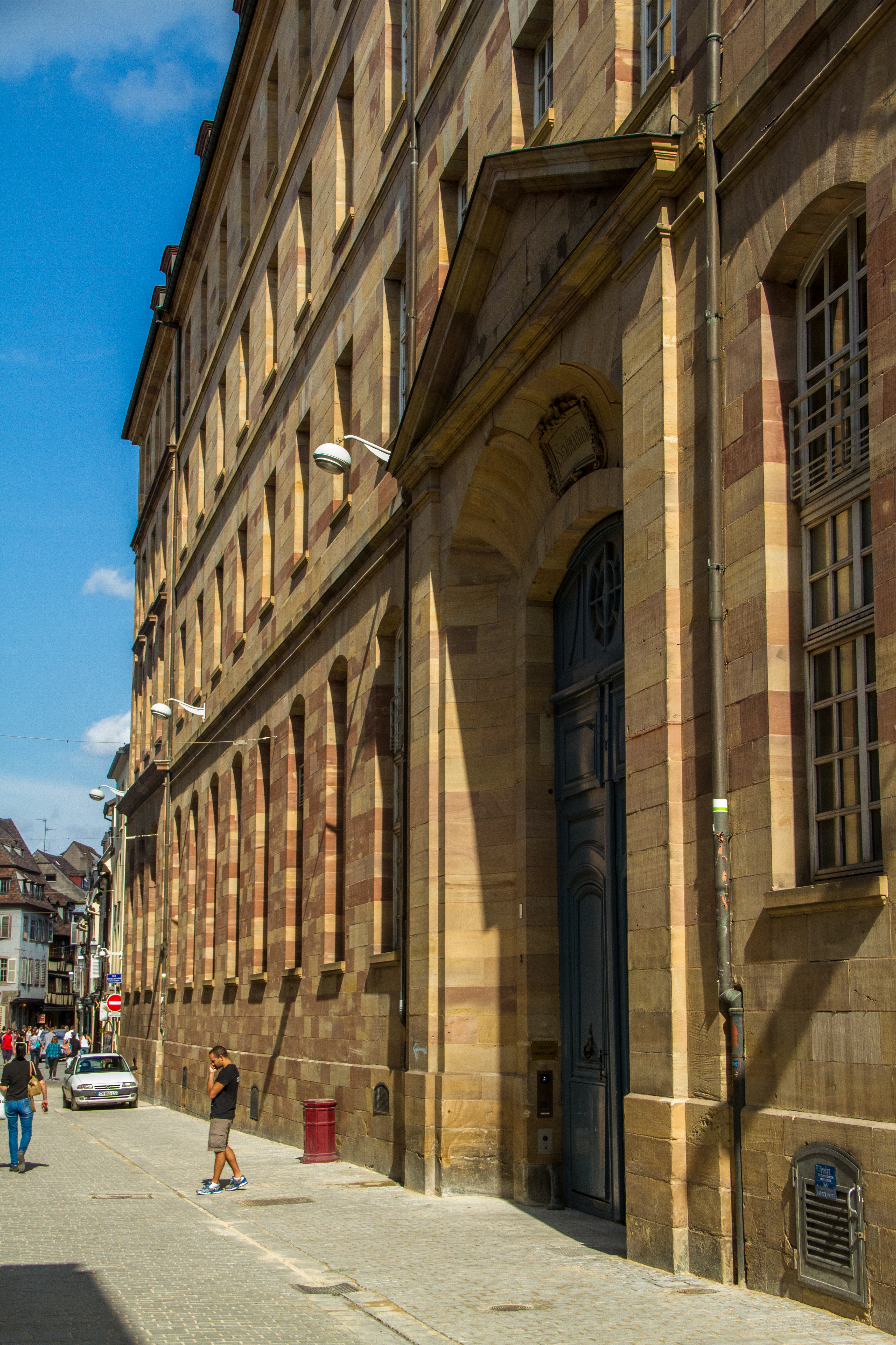 Strasbourg 2 rue des Frères, le Grand Séminaire de Strasbourg